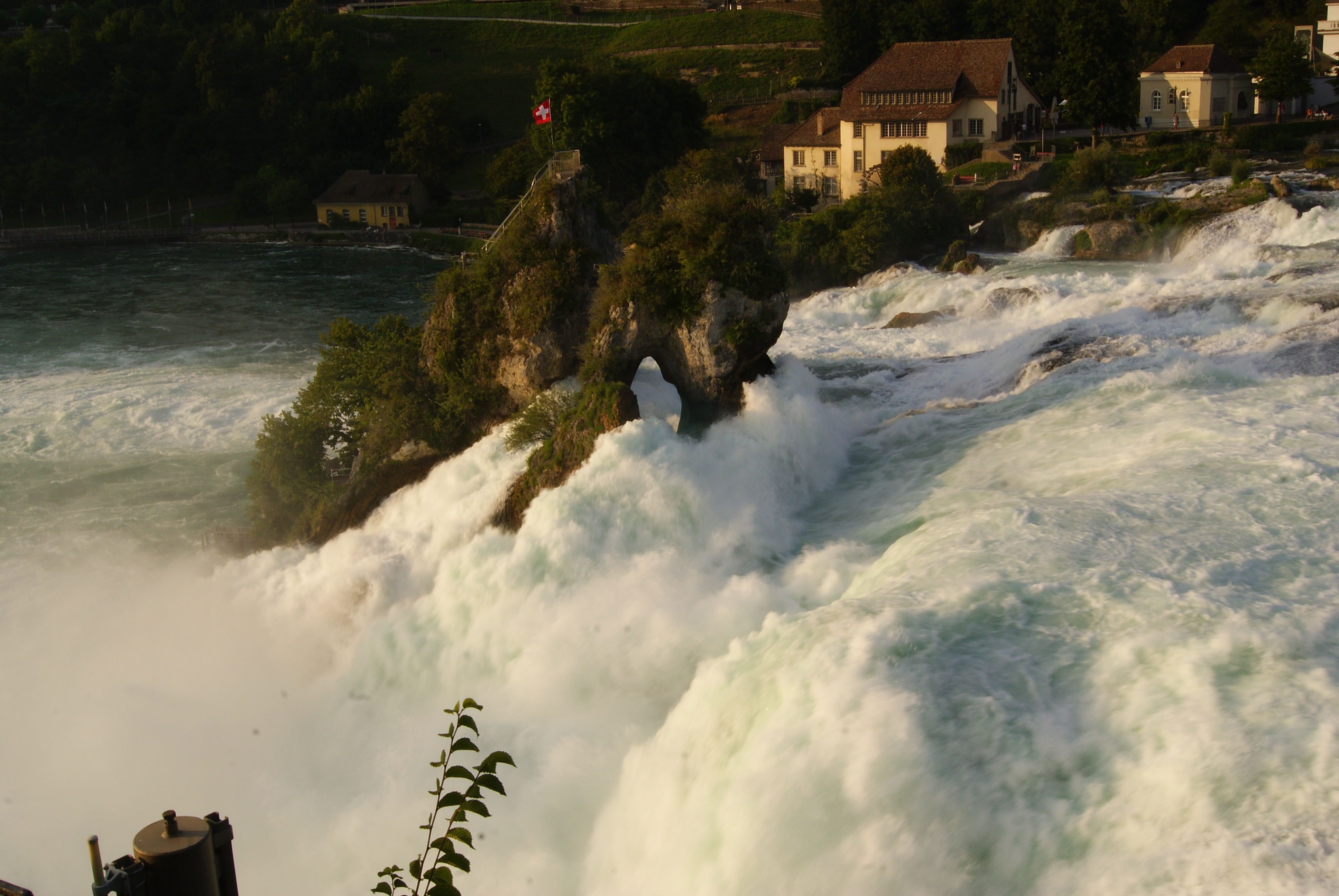 Salt del Rin